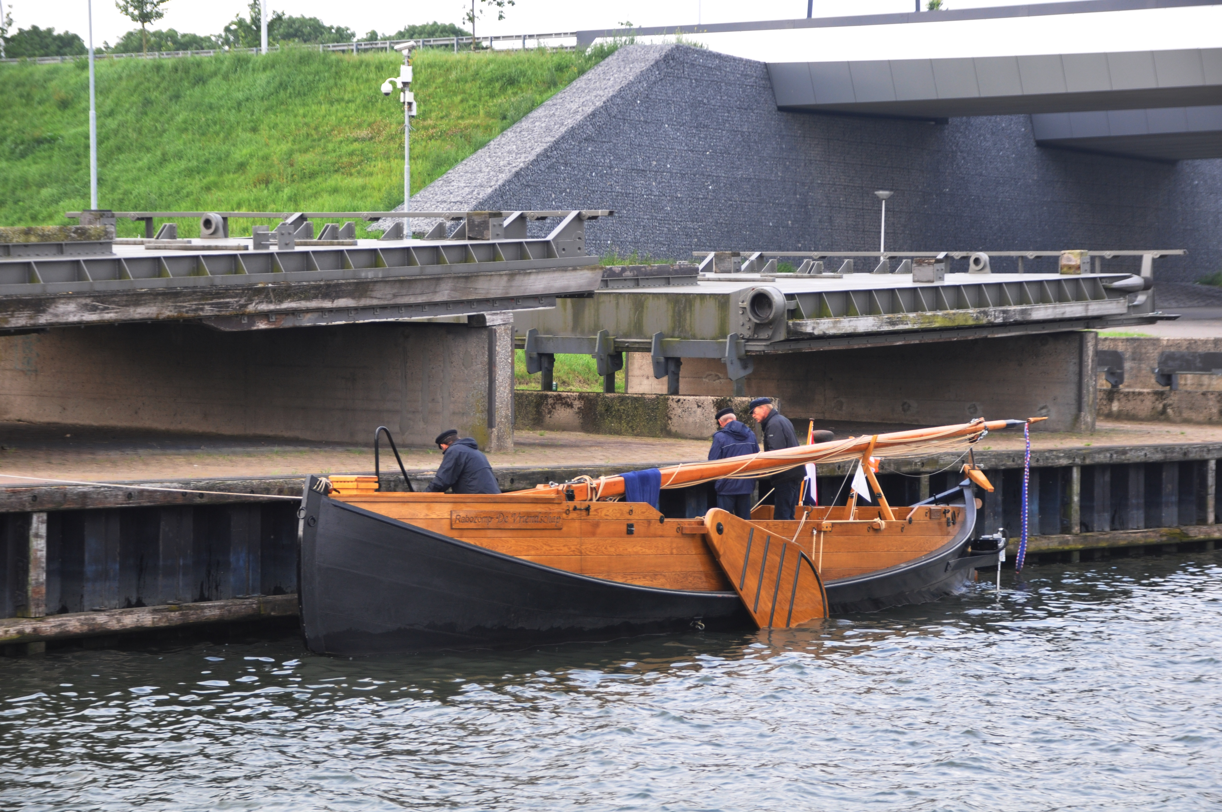 Rabozomp De Vriendschap uit 2011 bij de Spooldersluis, onderweg naar de reunie 2012 van de LVBHB in Hasselt.